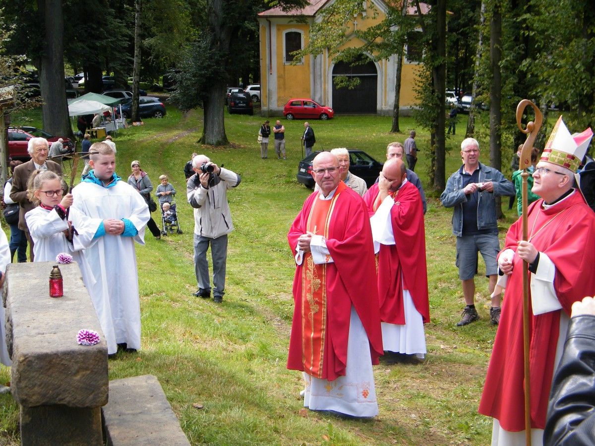 Žehnání křížové cesty na Anenském vrchu u Lobendavy litoměřickým biskupem Janem Baxantem